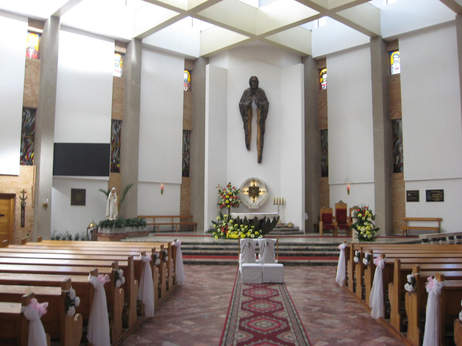 Nawa główna i prezbiterium 02